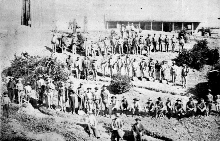 Imagen en Chile descripción física, política, social industrial y comercial de la República de Chile, por Carlos Tornero.1903